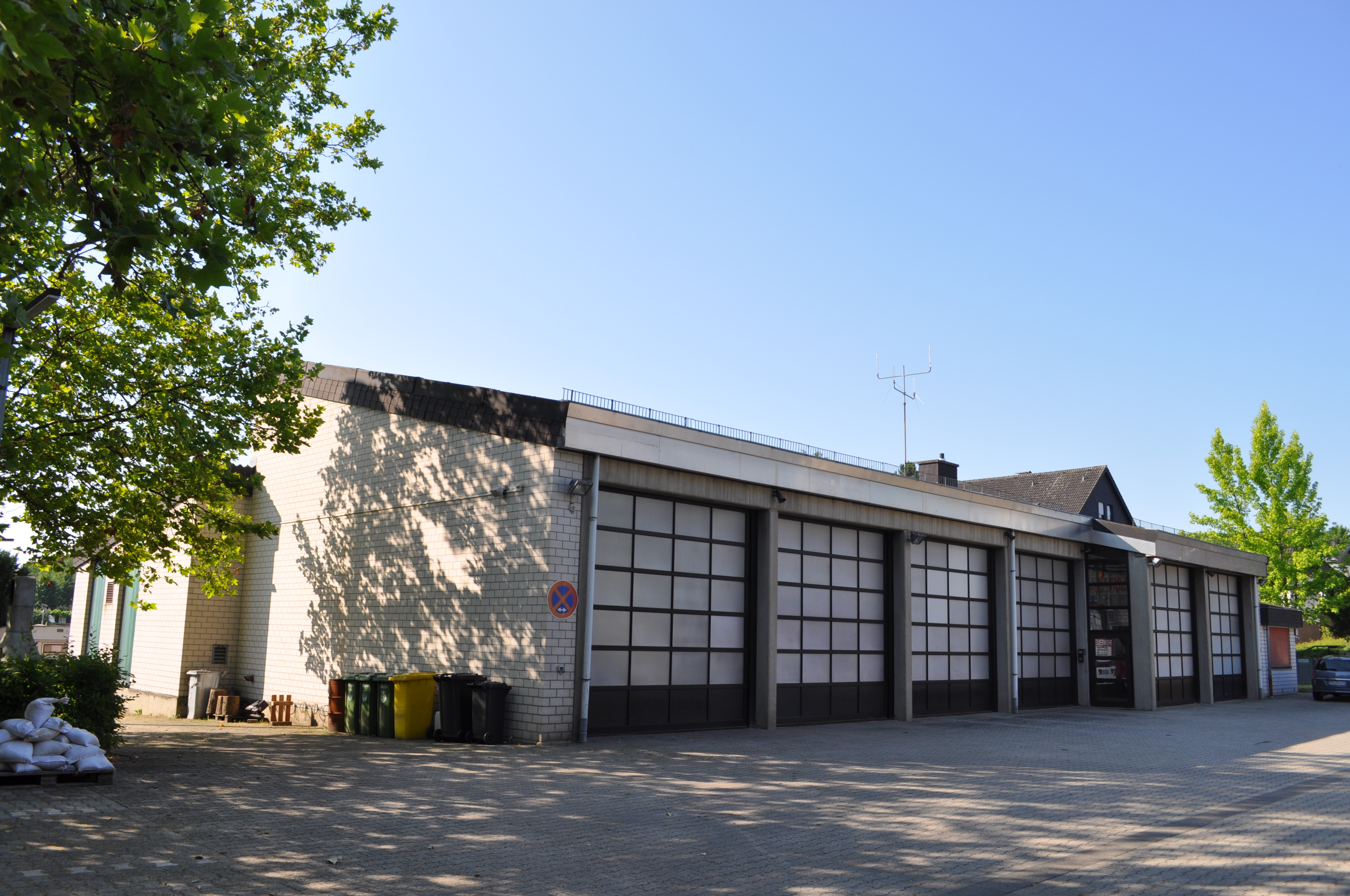 Feuerwehrgerätehaus in Sulzbach (Taunus)